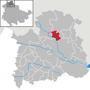 Gemeinde Niedersachswerfen in Thüringen, Landkreis Nordhausen